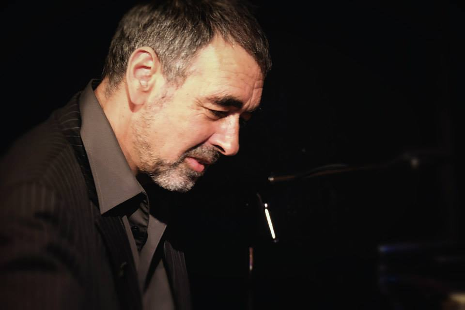 Christian Rannenberg 2015 (Konzert im A-Trane mit dem International Blues Duo)